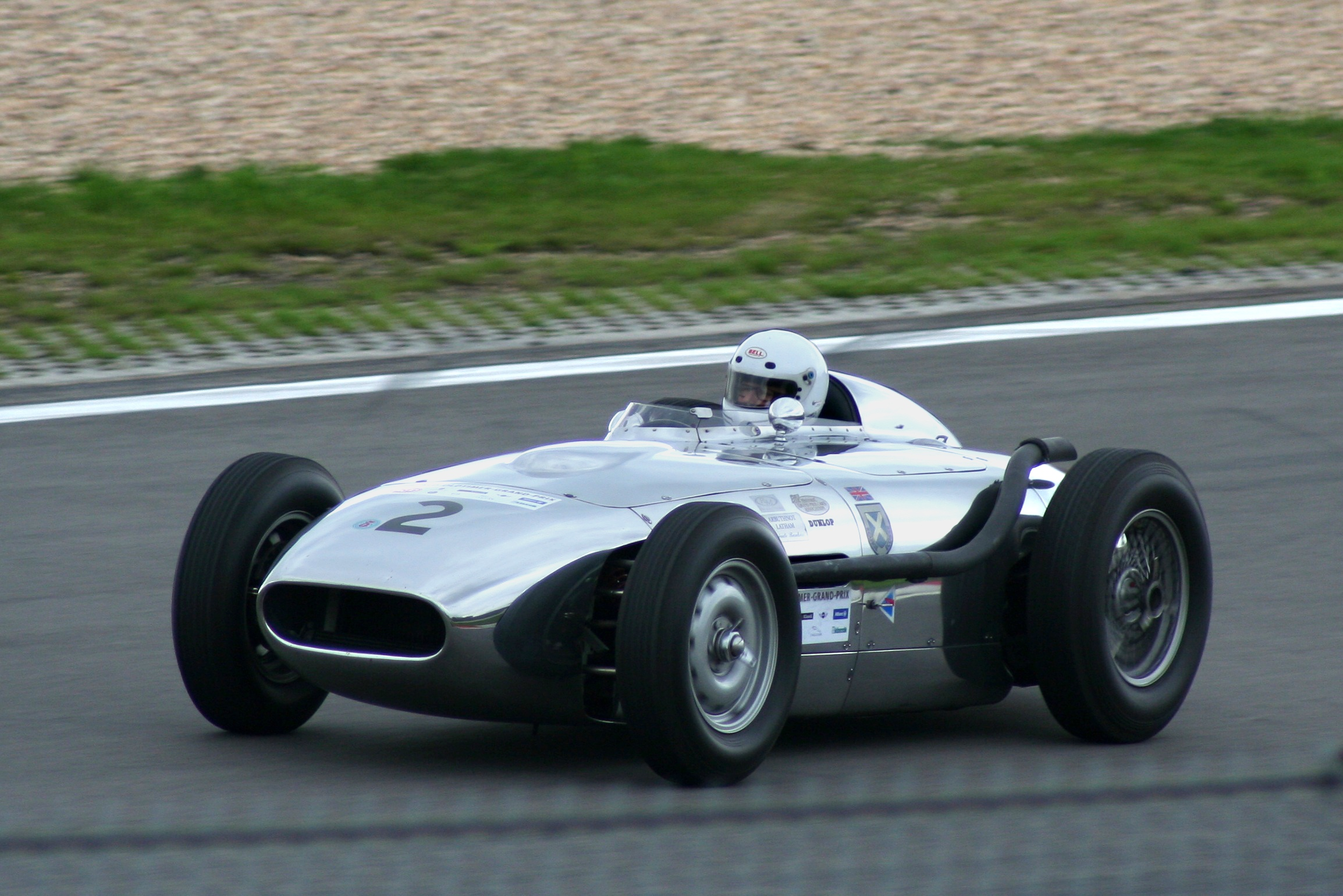 Monza Lister Jaguar, Ecurie Ecosse, Baujahr 1958, beim AvD-Oldtimer-Grand-Prix auf dem Nürburgring